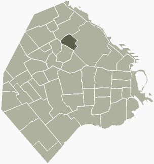 Barrio de Colegiales